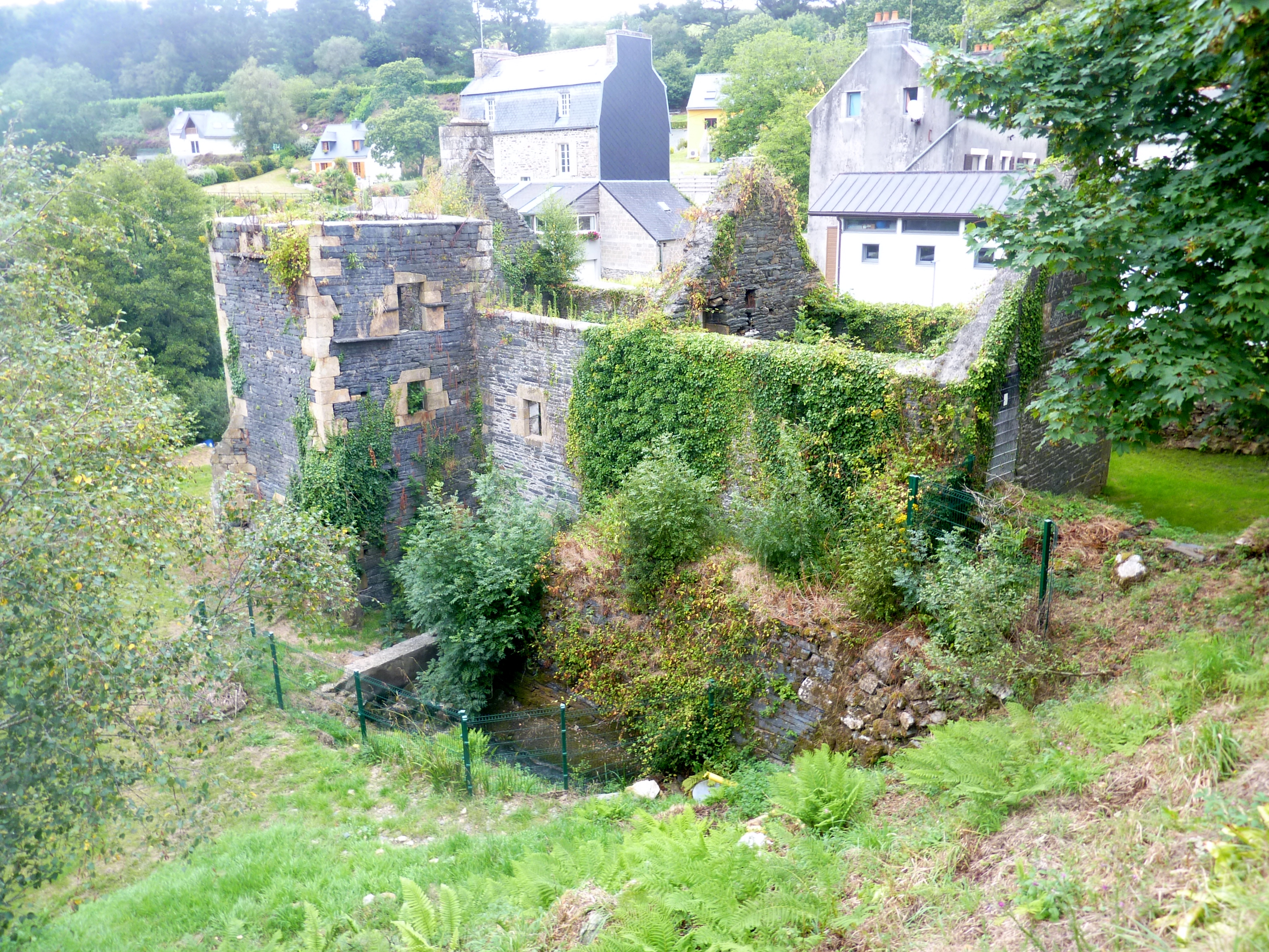 Dirinon : les ruines du moulin du Roual (état actuel)